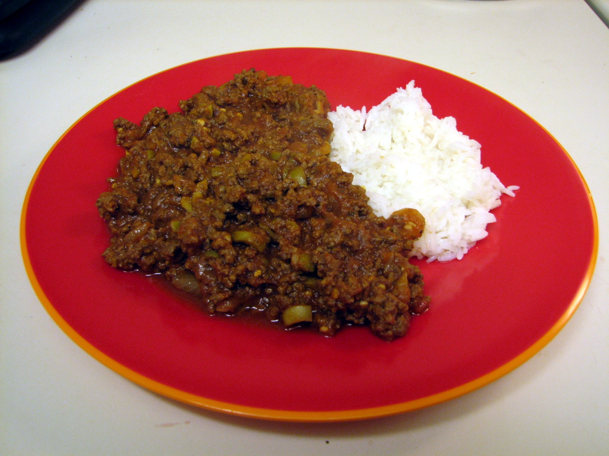 Picadillo and rice